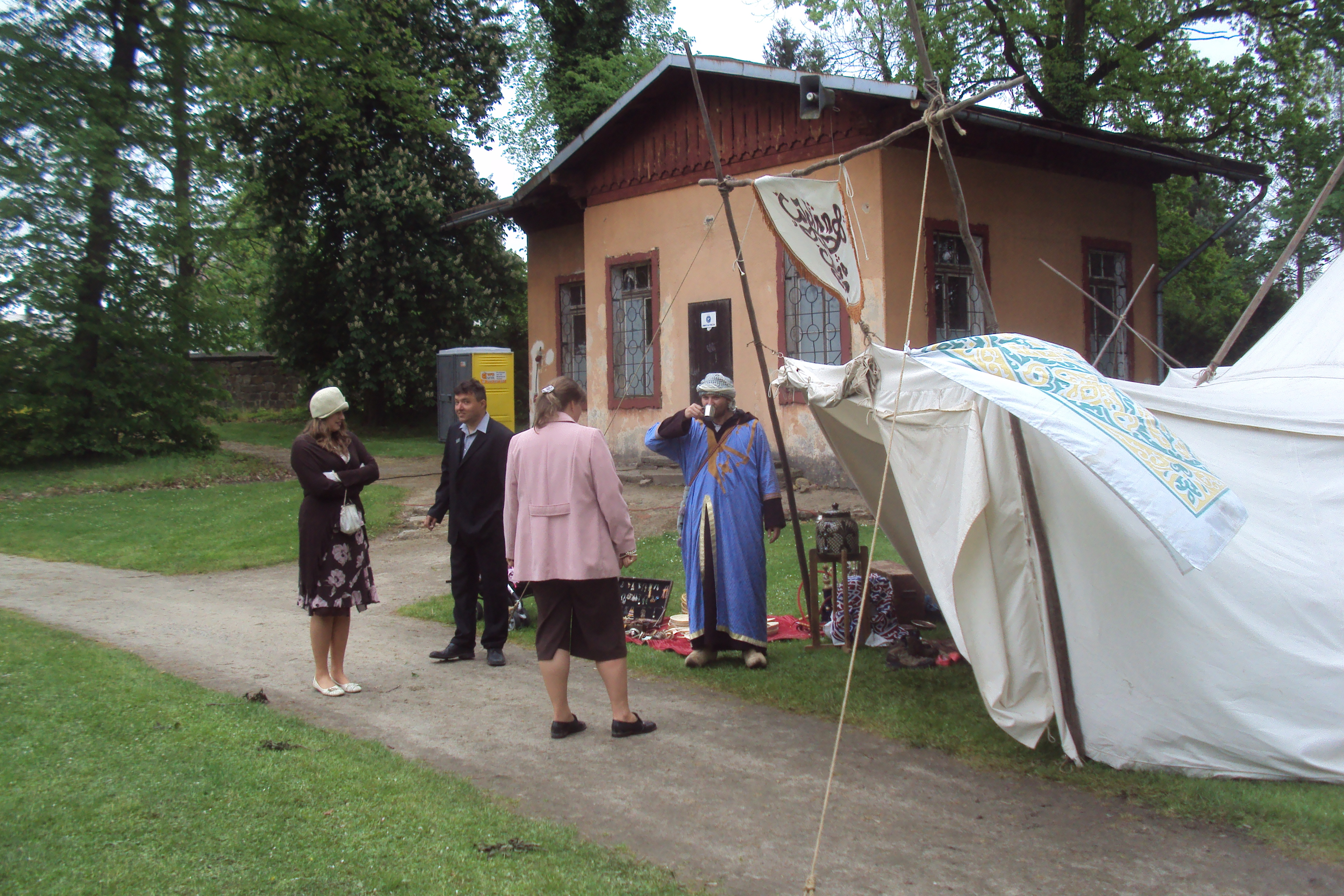 Stan s čajovnou při Císařských slavnostech v zámeckém parku